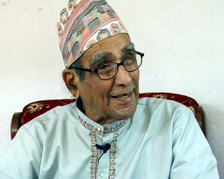 नेपाली: नेपाली साहित्यकार